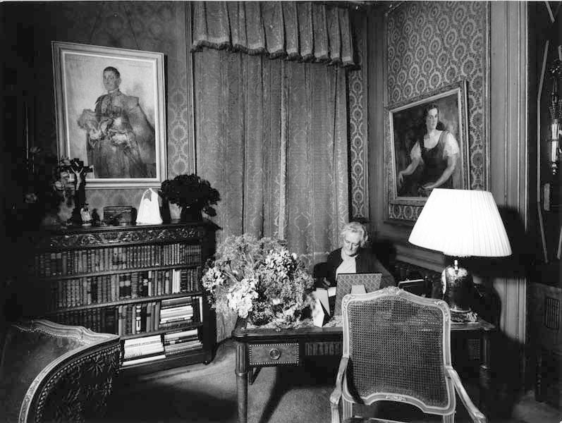 Interieur van villa Kruisdonk tussen Maastricht en Meerssen in 1970. De villa is gebouwd door Louis Regout in 1880. Aan de schrijftafel een nazaat van de Regouts, die er tot 1985 woonden. Voorheen lag hier een kruismolen. De westgevel wordt gedomineerd door een bordes. In de zuidgevel is de hoofdentree onder een gietijzeren afdak. Op het terrein bevindt zich verder een koetshuis en langs de straat een portierswoning. Fotocollectie RHCL Maastricht, GAM 9538.